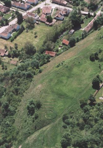 Bernecebaráti légifotója.